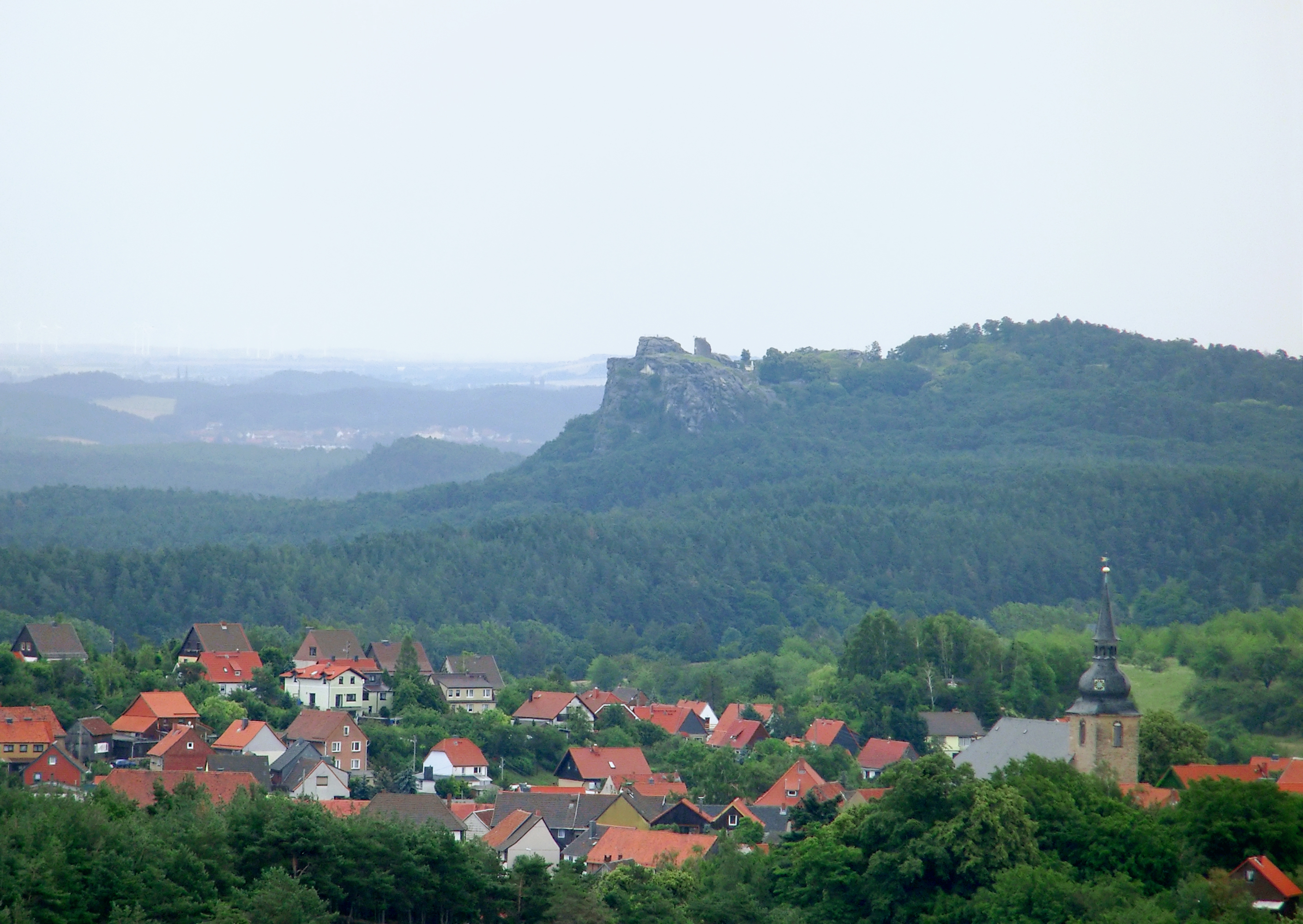 Die Burg Regenstein mit dem Ort Heimburg im Vordergrund, gesehen von den Ziegenbergen; Blankenburg in Sachsen-Anhalt